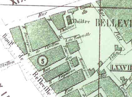 Détail d'un plan du 20ème arrondissement de Paris où figure le théâtre de Belleville.